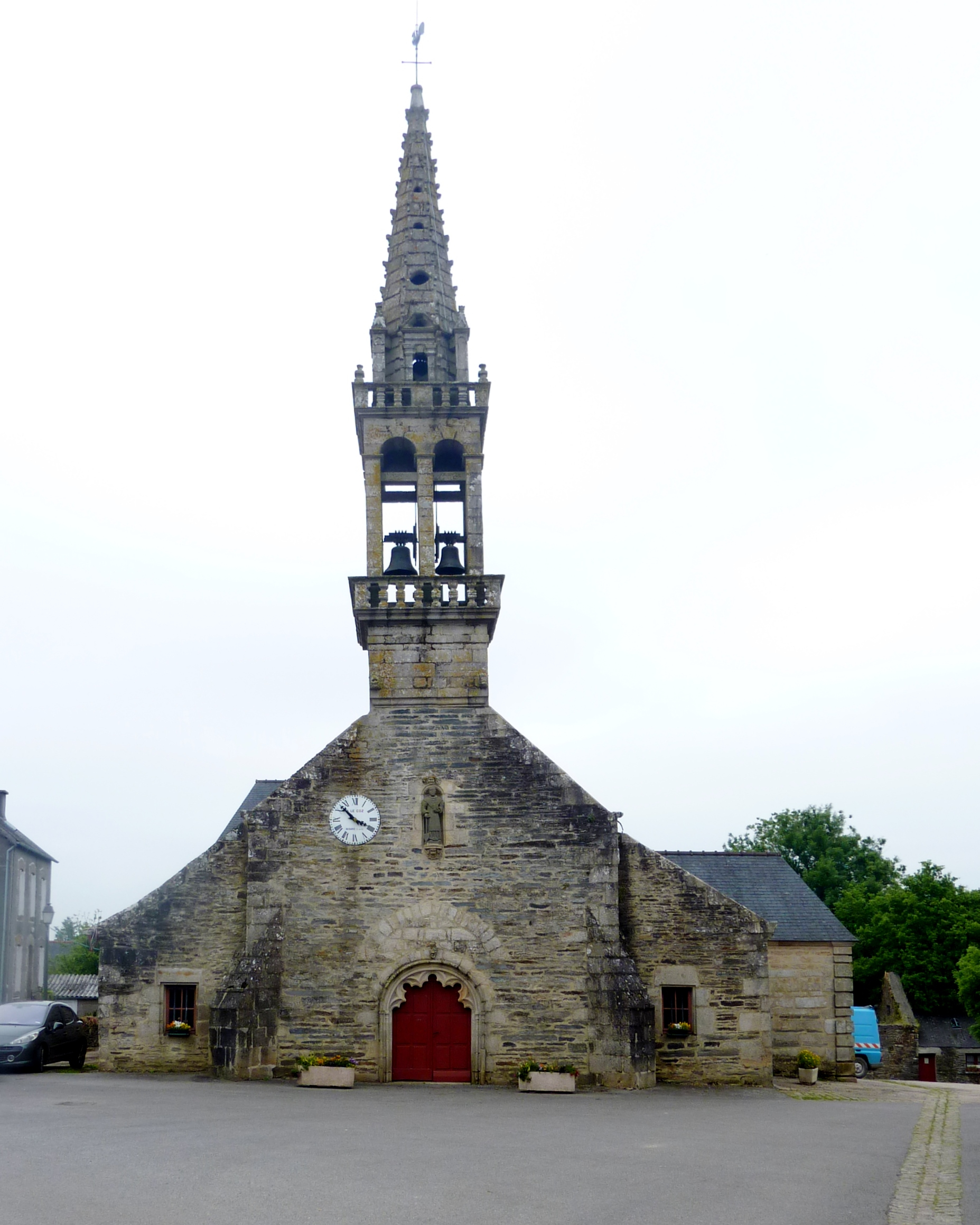 Saint-Thois : l'église paroissiale Saint-Exupère, anciennement Saint-Dispar. La fontaine, désormais un simple lavoir, a conservé le nom de Saint-Dispar .